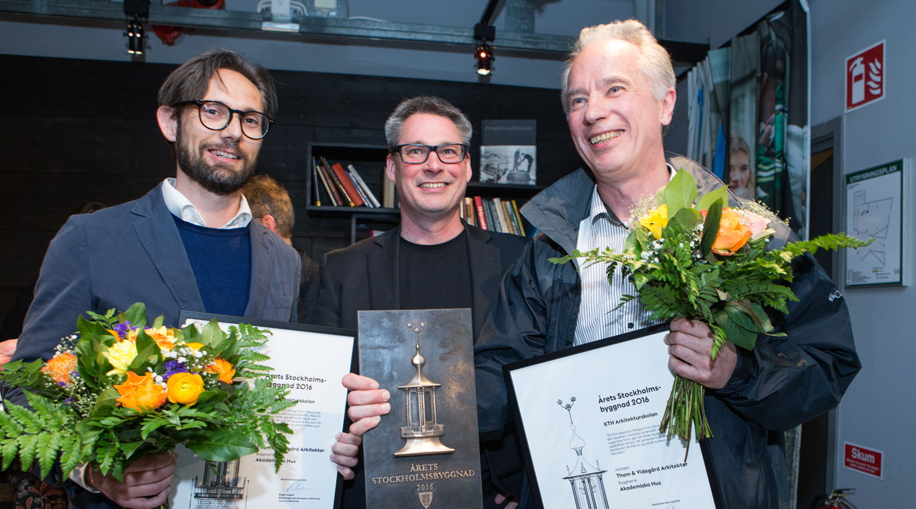 Prisutdelning, Årets Stockholmsbyggnad 2016. Kontorschef Mikael Stenqvist på Tham & Videgård Arkitekter tar emot priset tillsammans med Sten Wetterblad, regionchef för Akademiska Hus i Stockolm. Stadsbyggnadsborgarråd Roger Mogert delar ut prisen.